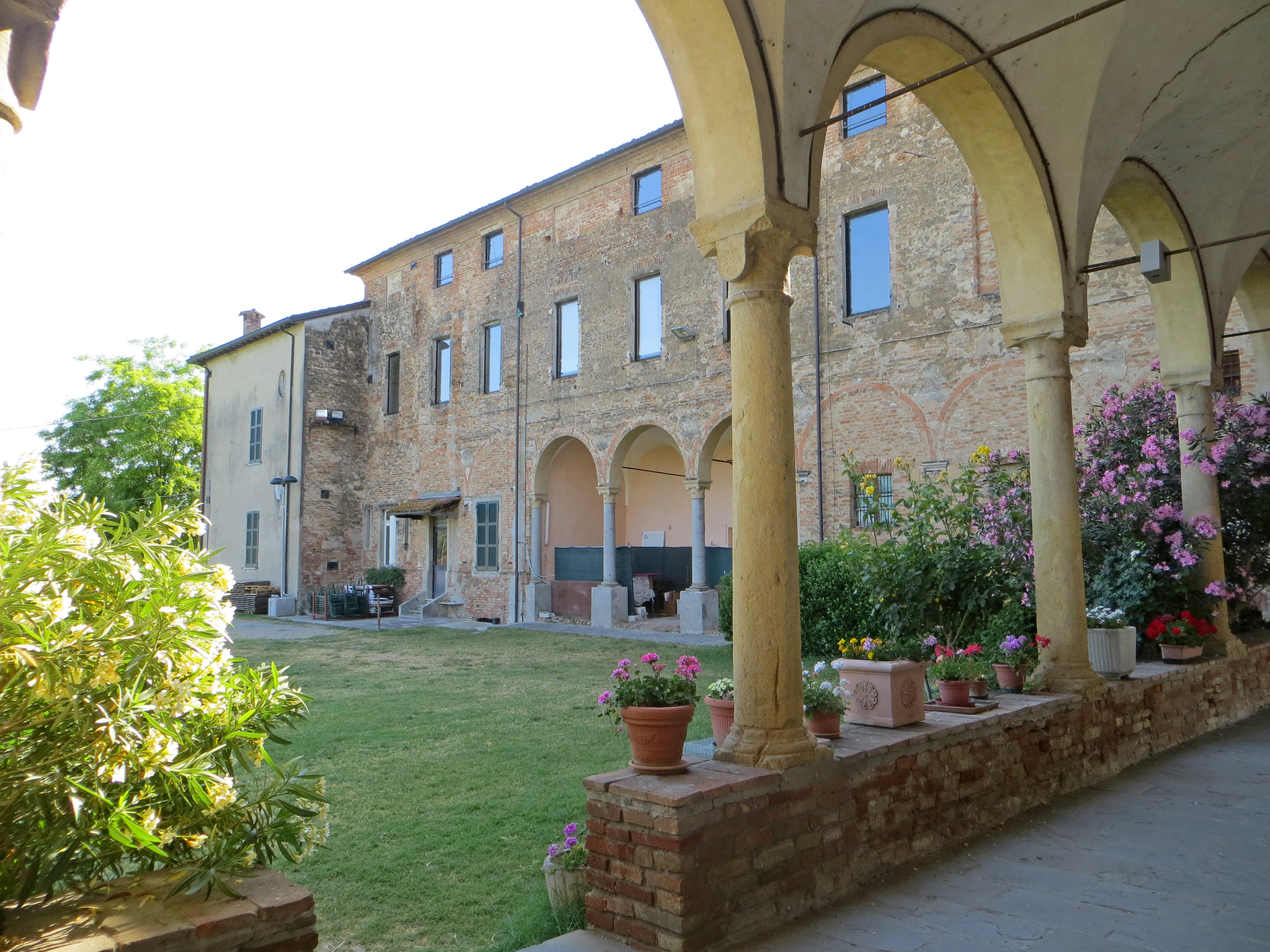 Monastero di Santa Maria Assunta (Castione Marchesi, Fidenza) - lato ovest del chiostro